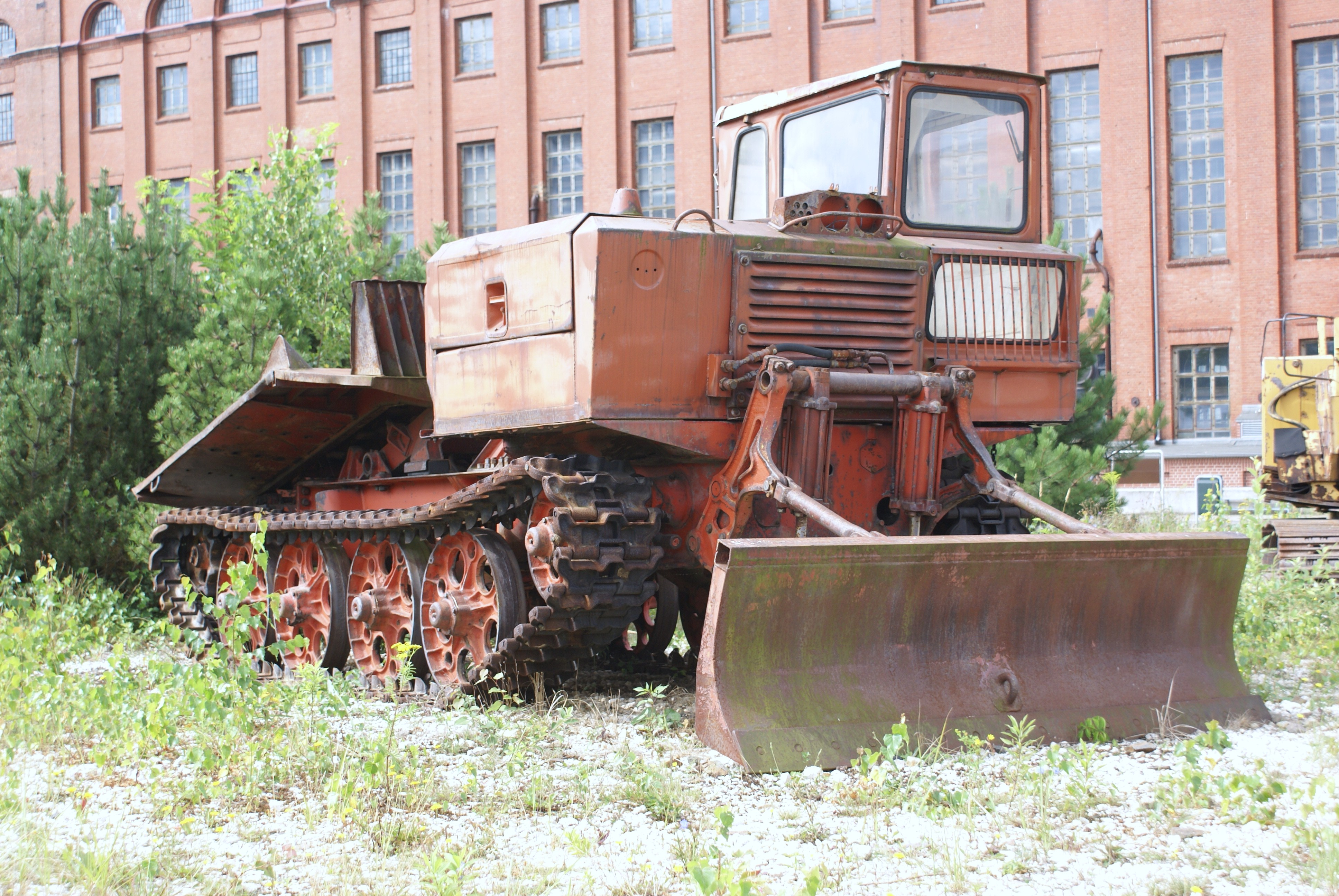 Energiefabrik Knappenrode in Hoyerswerda-Knappenrode